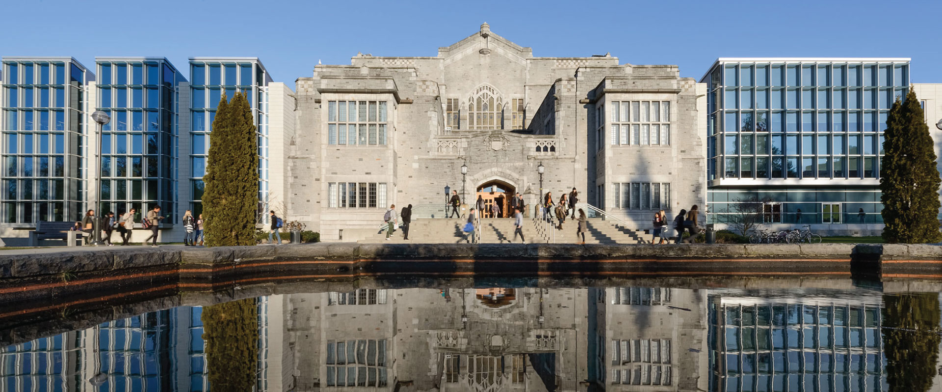 Illustration principale bibliothèque du campus de Vancouver